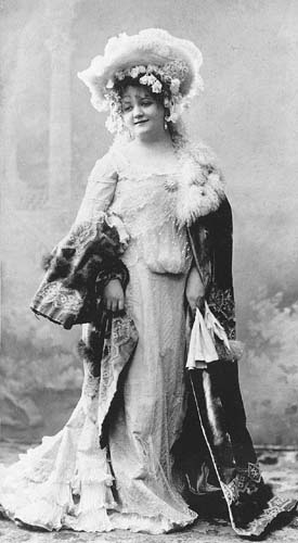 Szoyer Ilonka (1879. július 24. – 1956. február 2.) magyar operaénekesnő, drámai és koloratúrszoprán